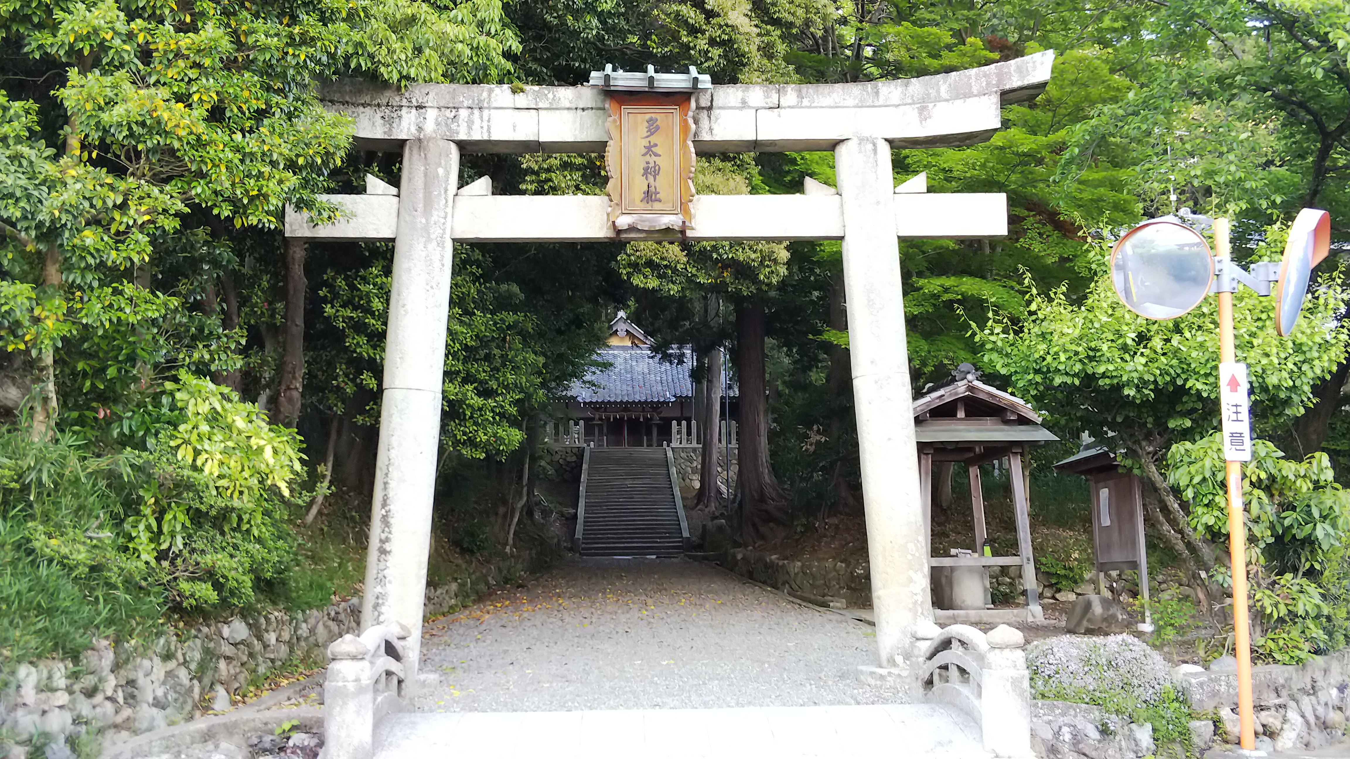 多太神社一の鳥居